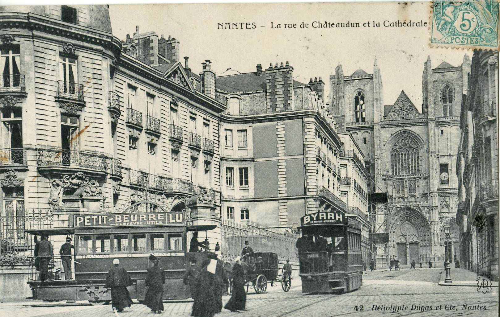 Carte postale ancienne éditée par l'Héliotypie Dugas à Nantes, n°42 : NANTES - La rue de Châteaudun (actuelle rue du Général-Leclerc-de-Hauteclocque) et la Cathédrale